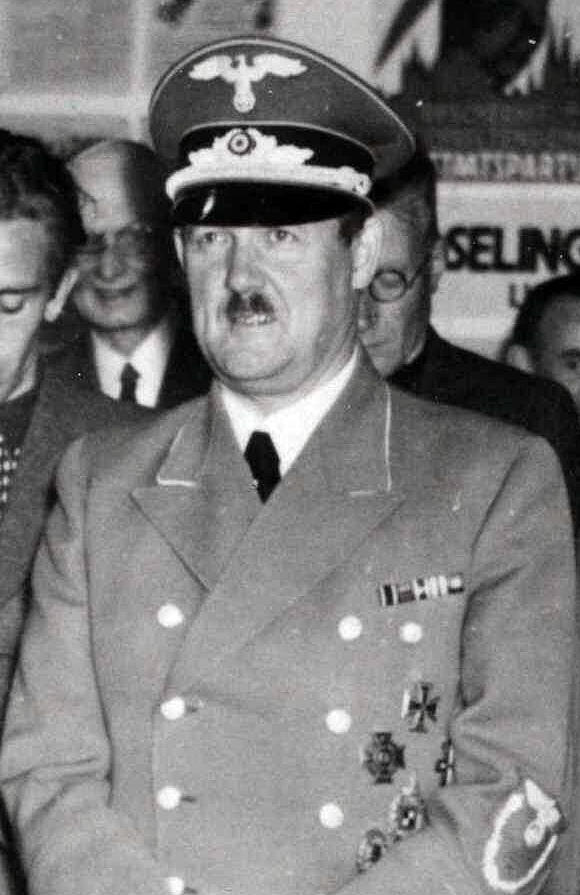 Dr. Werner Friedrich Ross, "Beauftragte für die Provinz Friesland" in Leeuwarden, van 30 juli 1940 tot 14 april 1945. Ross heeft waarschijnlijk verschillende keren aangedrongen op represaillemaatregelen na aanslagen en sabotageacties van de Friese illegaliteit. Na de bevrijding werd Ross door de arrondissementsrechtbank te Haarlem veroordeeld tot een gevangenisstraf van twintig jaar. (Bron gegevens: NIOD Instituut voor Oorlogs-, Holocaust- en Genocidestudies)